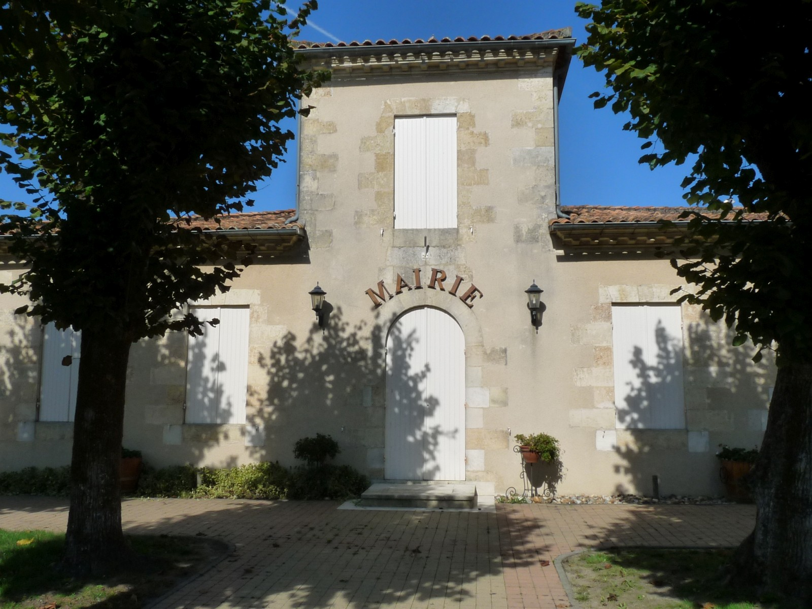 Mairie de Civrac-de-Blaye, Gironde, France